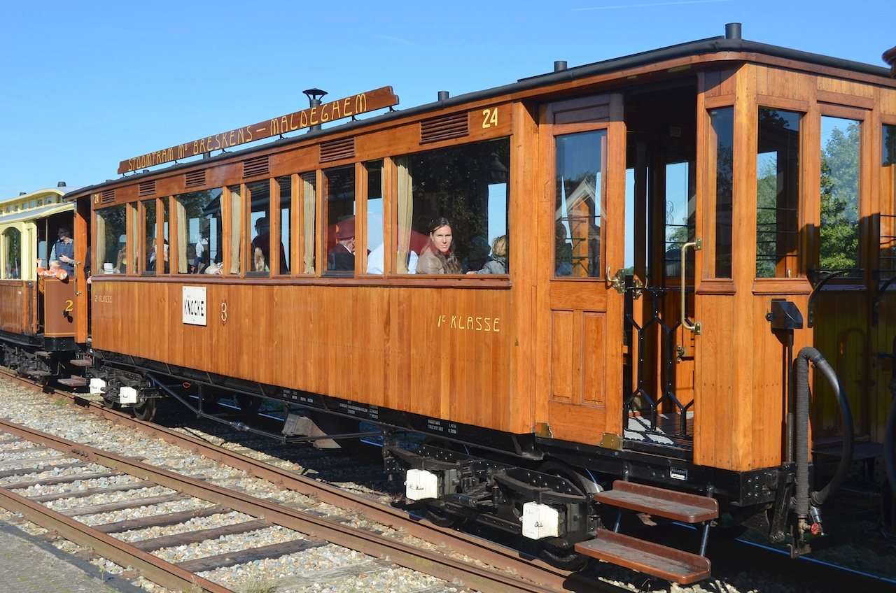 SHM rijtuig AB 24 van de Stoomtram Breskens-Maldegem, te Wognum; 29 september 2013. Foto: Erik Swierstra.